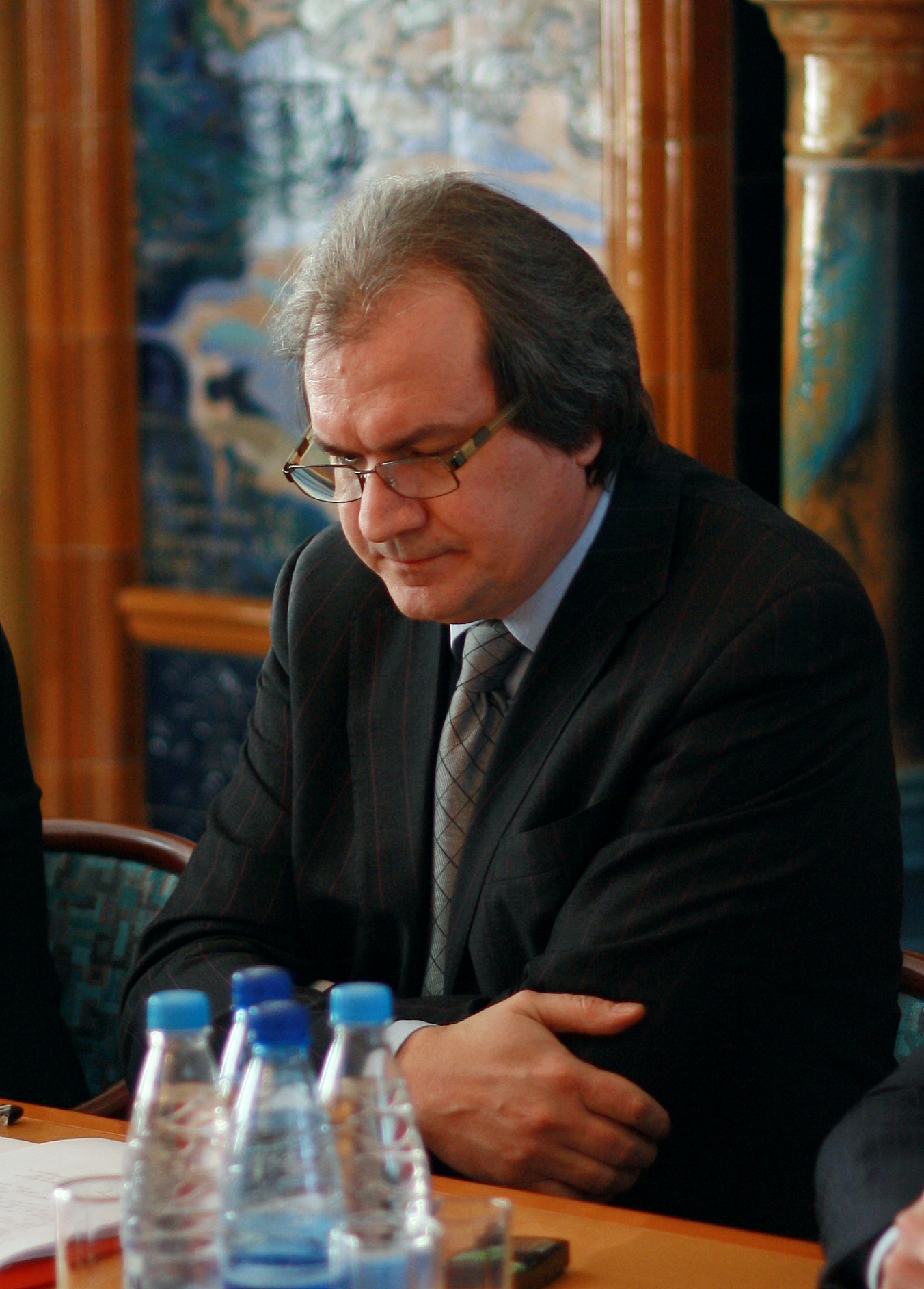 Российский журналист и общественный деятель. Главный редактор журнала «Эксперт», директор Института общественного проектирования, член Общественной палаты.